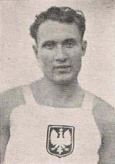 Bronisław Gancarz, polski biegacz długodystansowy i maratończyk.Unknown polish long distance- and marathon runner bronisław gancarz.